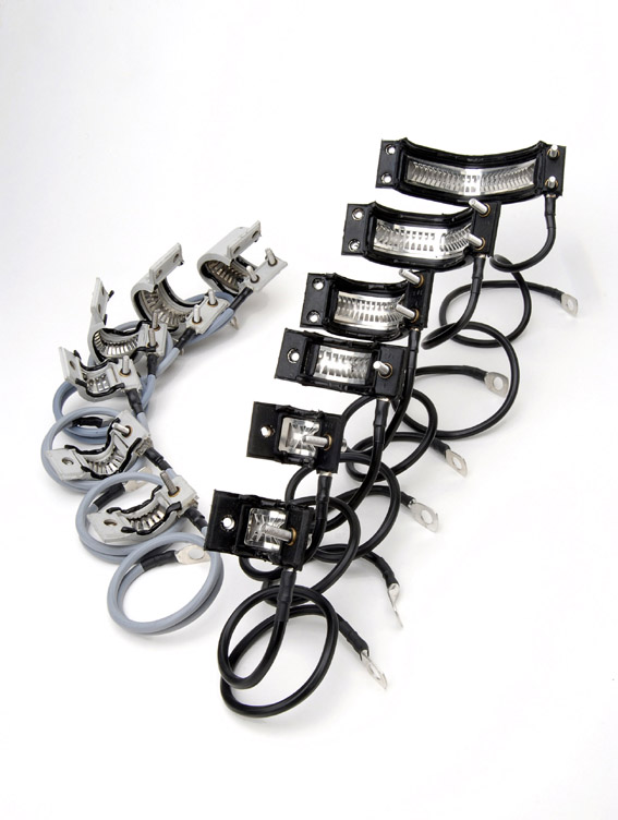 Erdungsmuffen